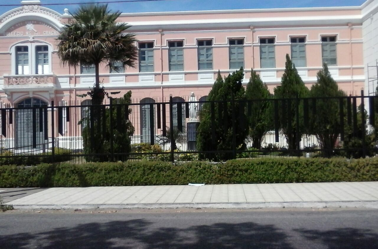 Colégio Nossa Senhora da Graça de Parnaíba-Piauí.